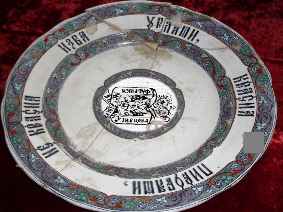 У Волноваському районному краєзнавчому музеї серед інших унікальних експонатів є керамічна тарілка. Виготовлена на фабриці Кузнєцова М.С у 1893 році. На тарілці можна побачити напис «Не красна изба углами, красна пирогами,». На зворотньому боці спеціальне клеймо фабрики Кузнєцова М.С.